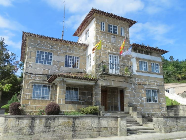 Casa do Concello